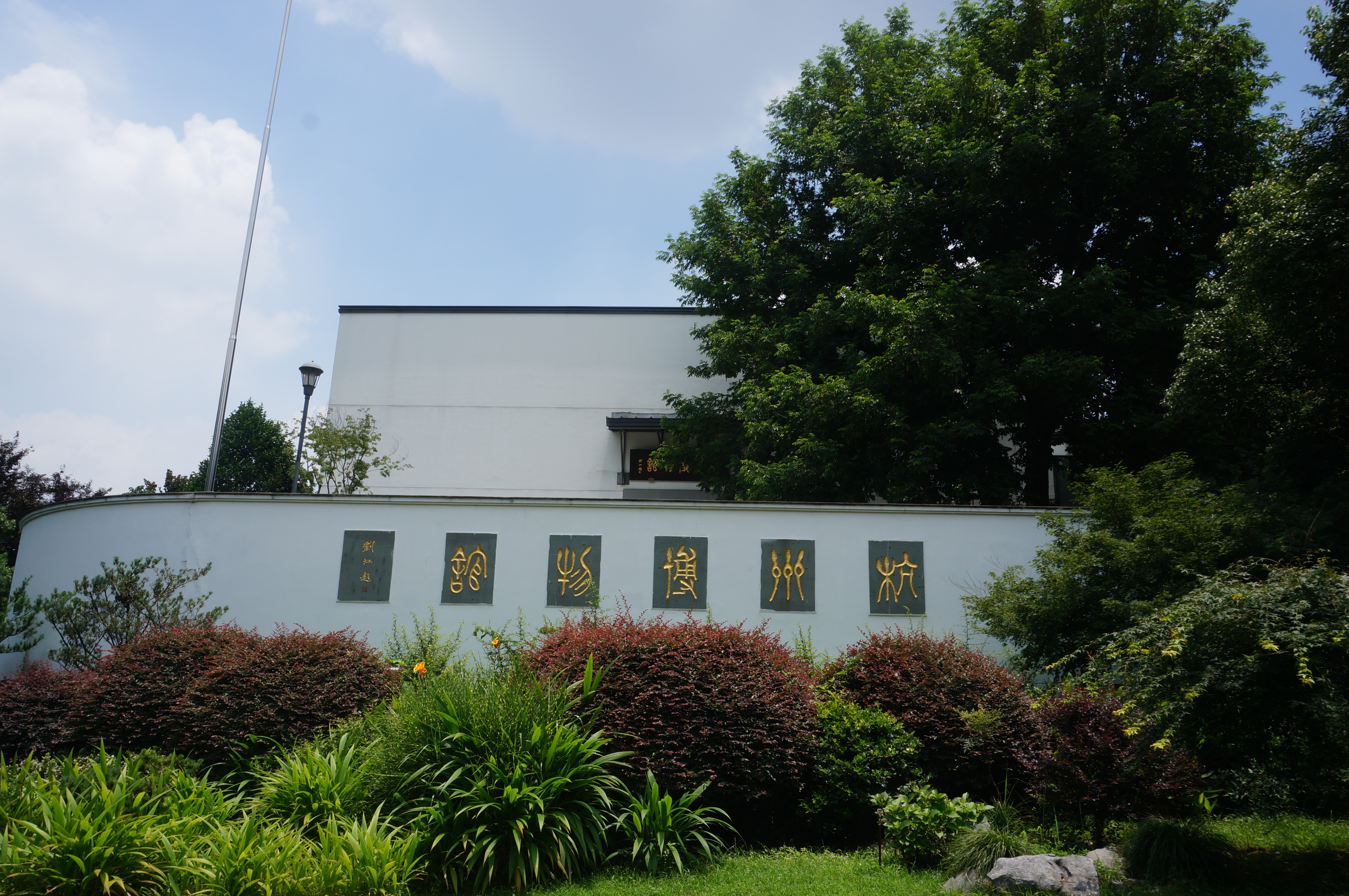 杭州博物馆（原杭州历史博物馆），南馆西面。